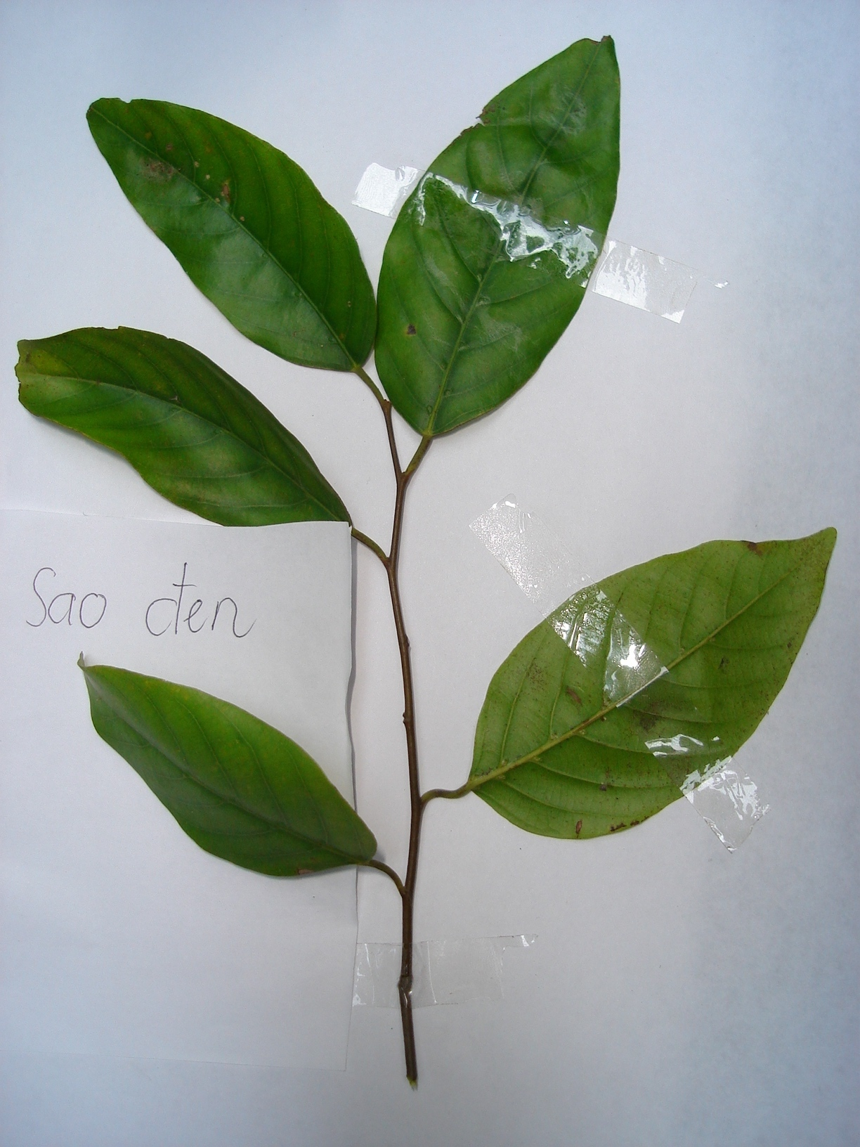 Ảnh chụp cành mang lá cây sao đen